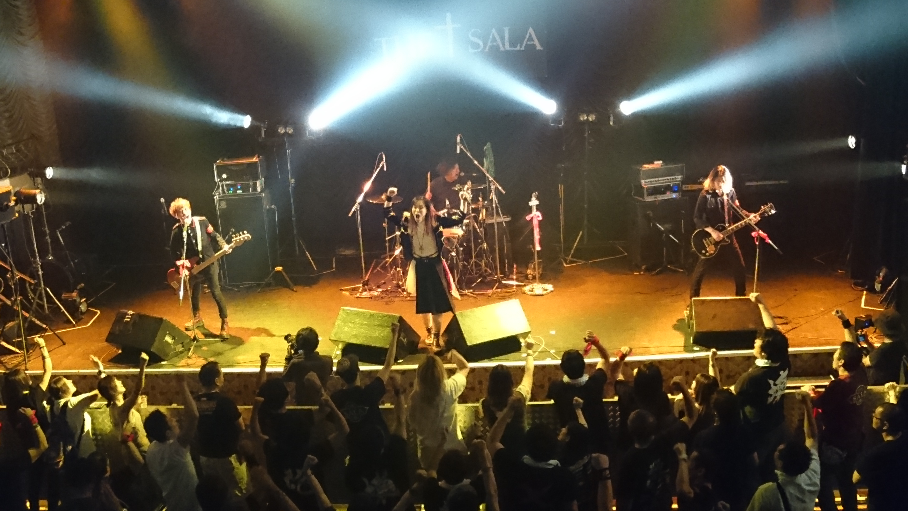 THESALA東京キネマ倶楽部